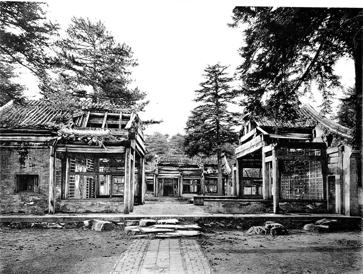 photo from Ein Tagebuch in Bildern